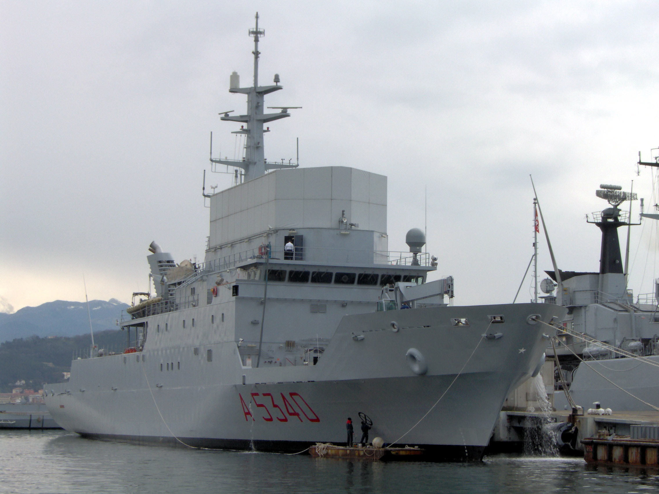 Nave Elettra nella base di La Spezia